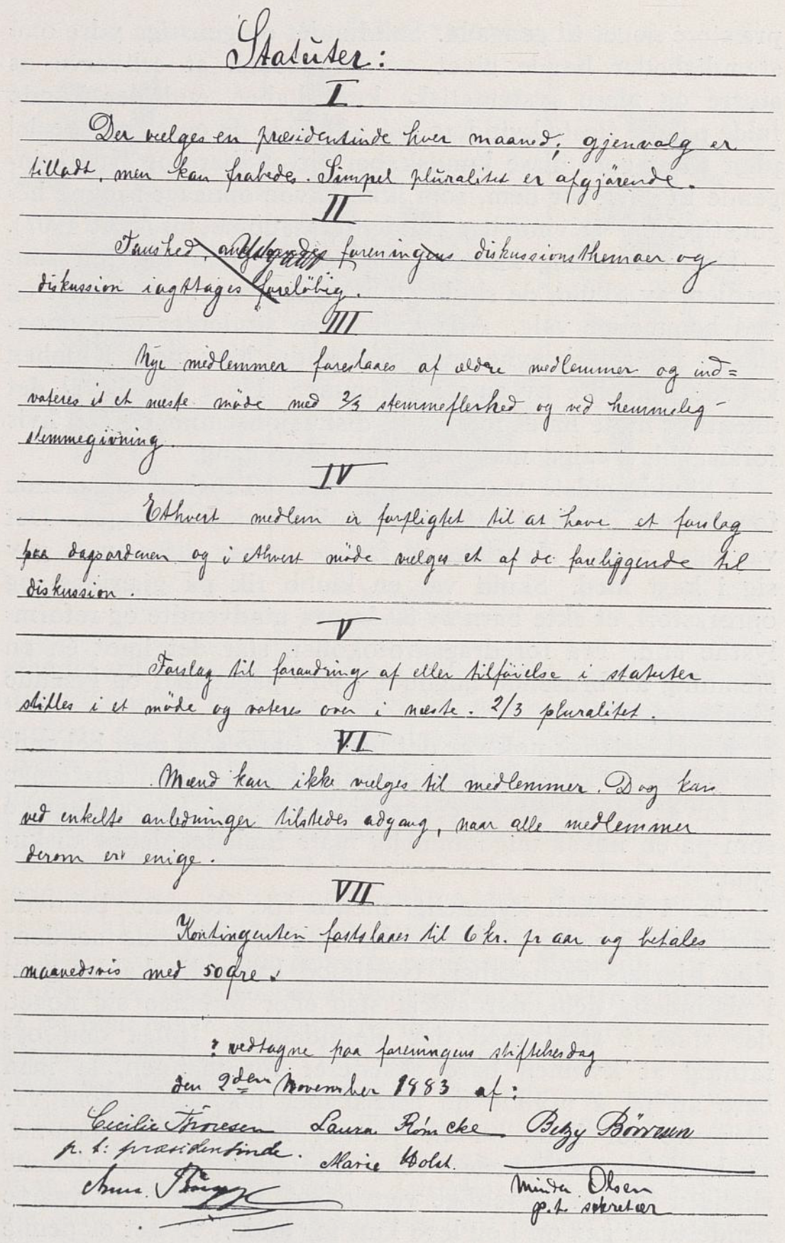 Diskusjonsforeningen Skuld ble stiftet i Christiania av seks kvinnelige gymnasiaster og studenter. Præsidentinde var fra starten Cecilie Thoresen